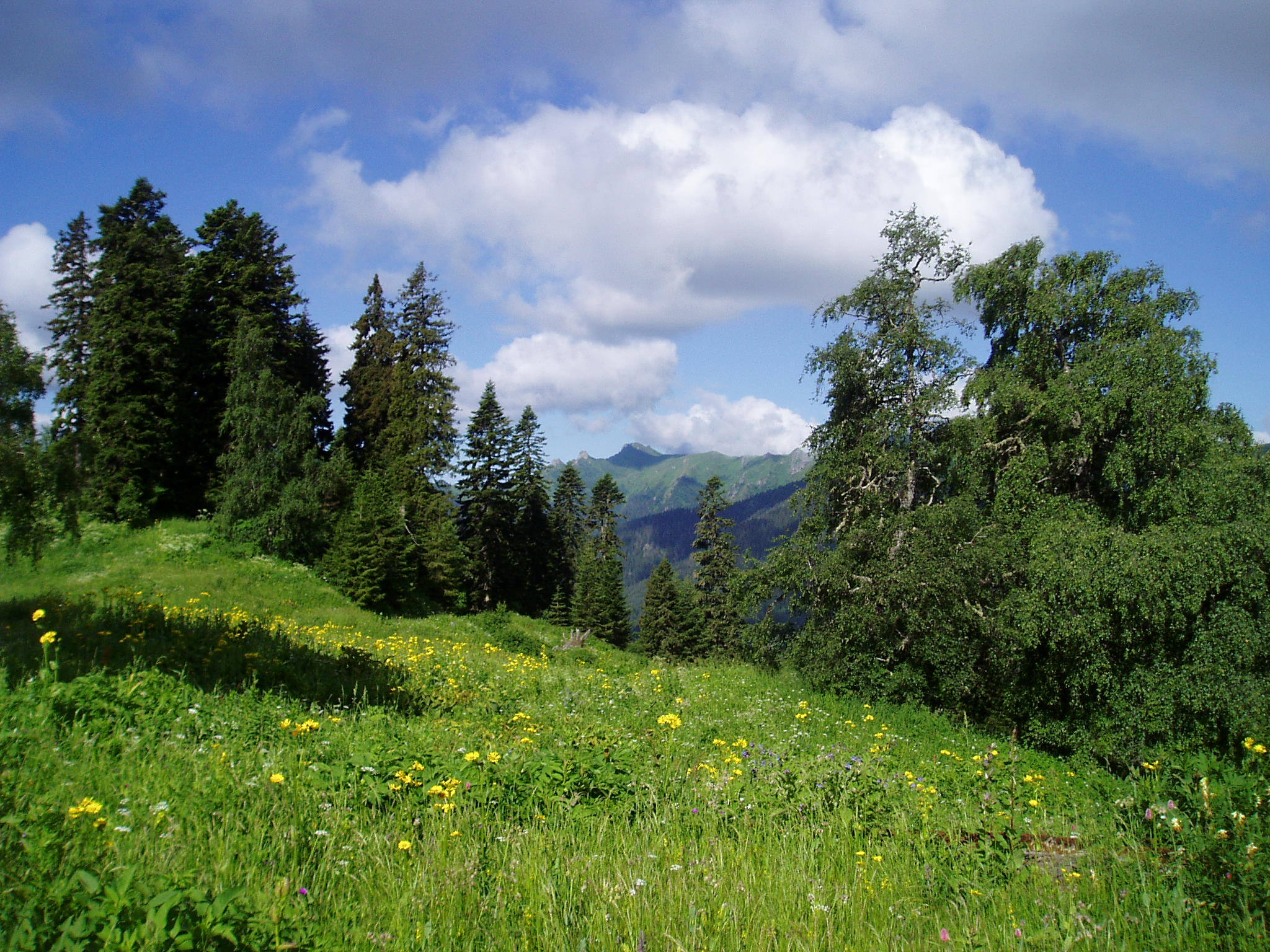 AbastumaniEesti: Abasthumani